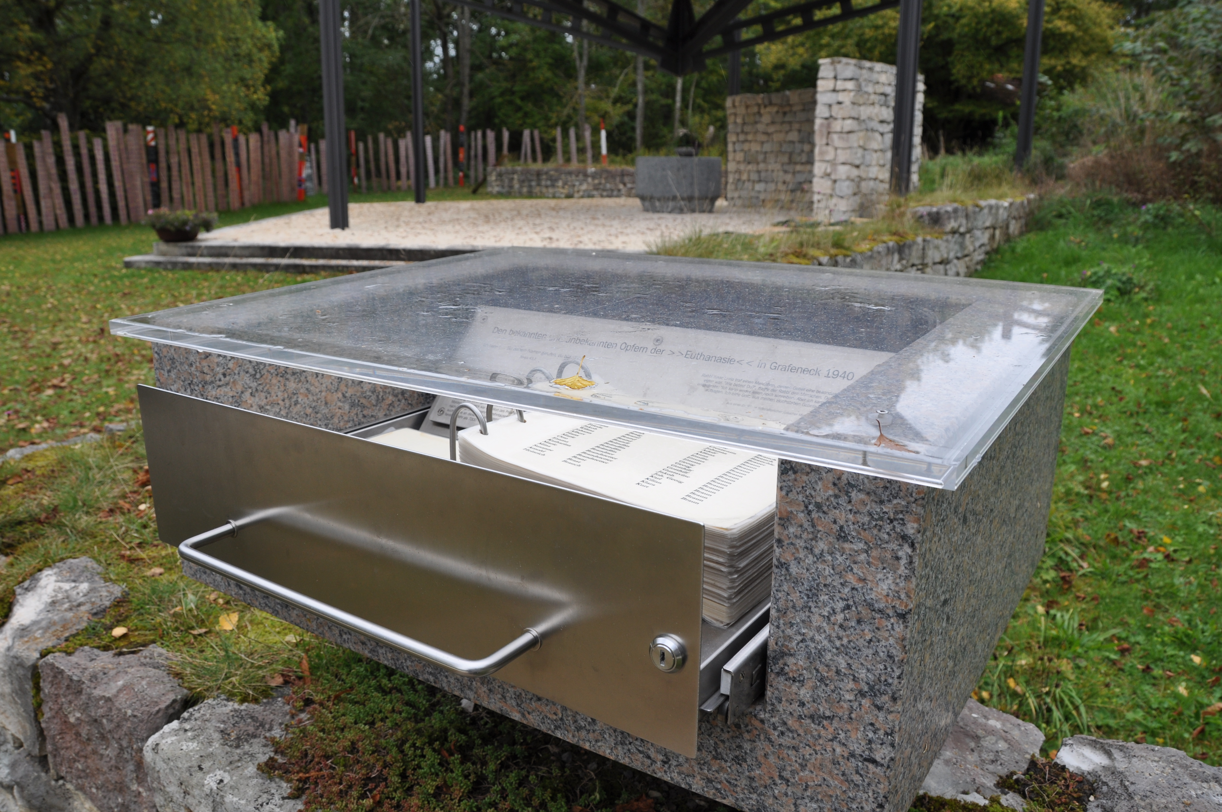 Schloss Grafeneck (Tötungsanstalt Grafeneck), Gedenk- und Namensbuch